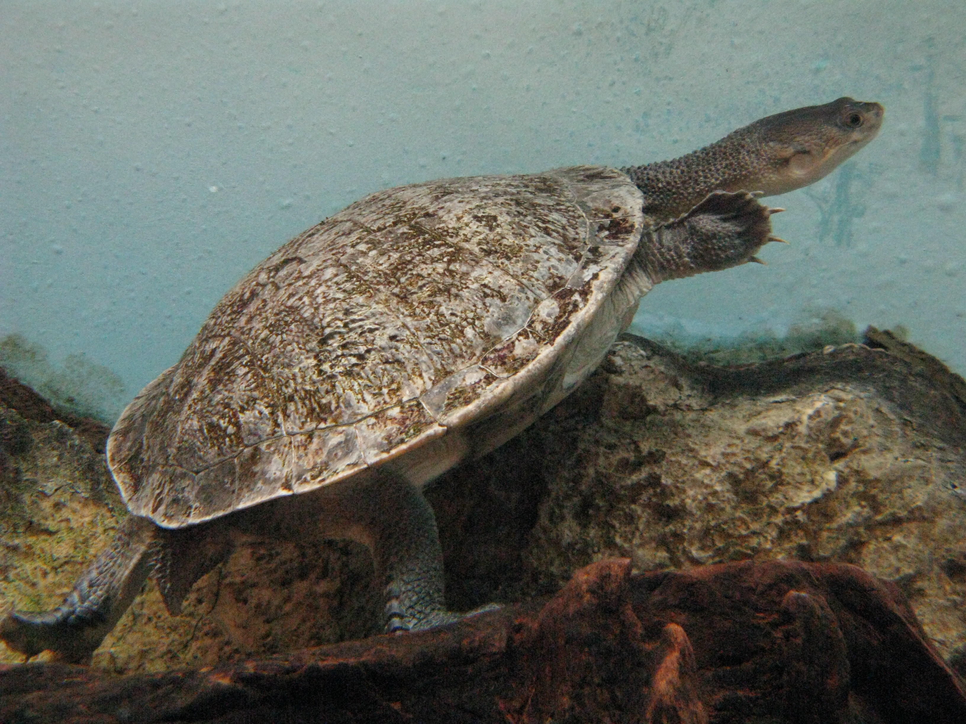 Scientific name Chelodina sp.（C. novaeguineae, C. pritchardi?）